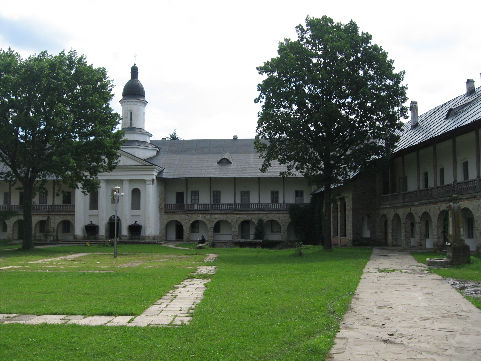 Mănăstirea Neamţ 03